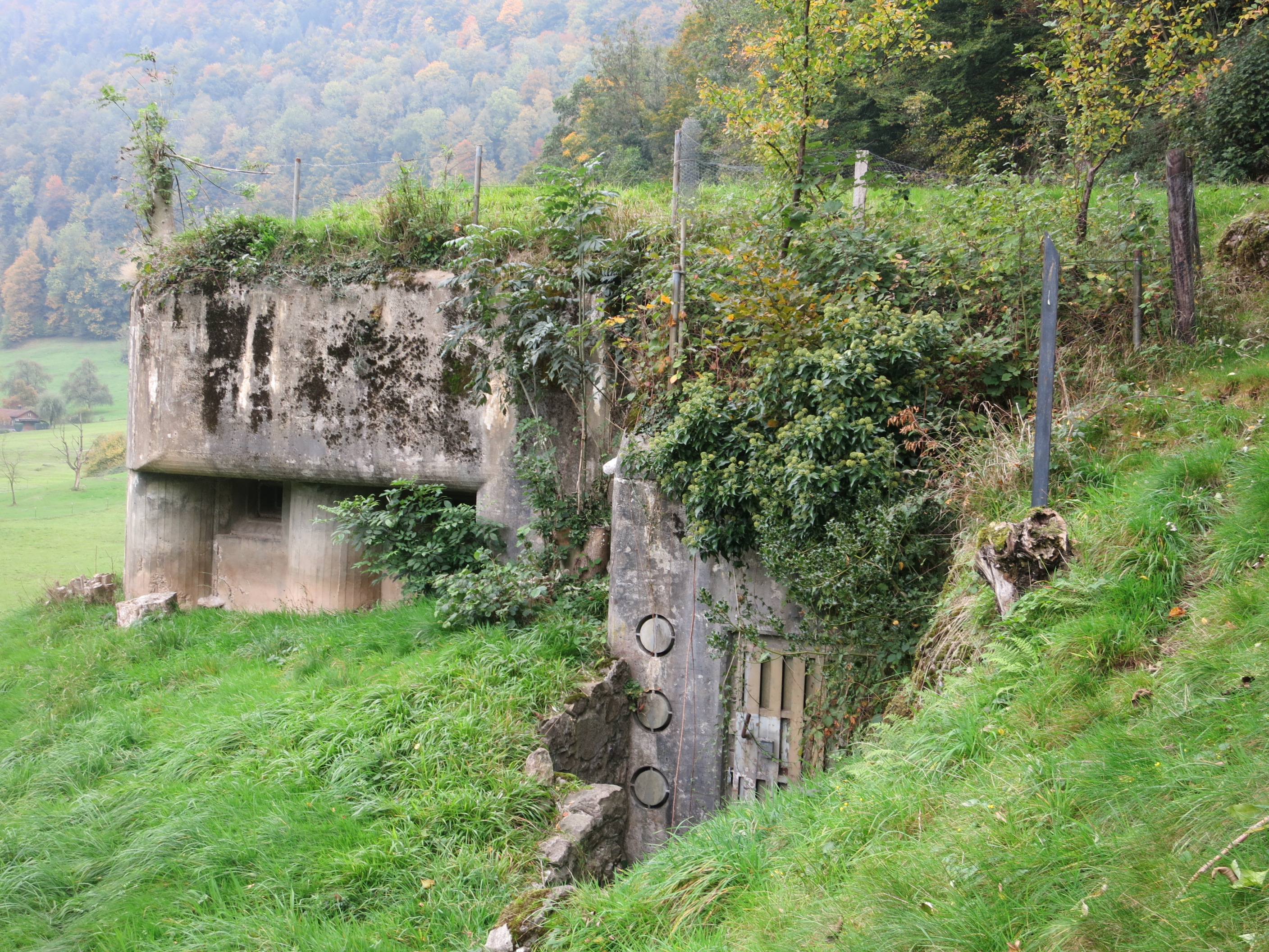 Sperrstelle Oberarth SZ, Schweiz